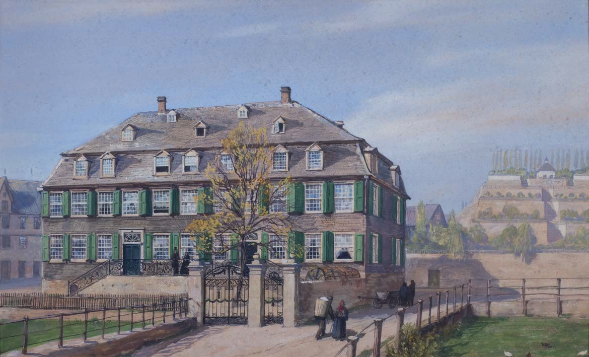 Georg Macco, Haus Schüren in Barmen, Aquaell, G. Theodor Wuppermann